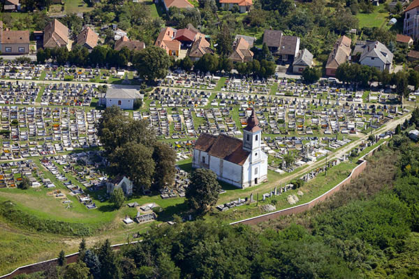 Nagyboldogasszony-templom 2018-ban csak kápolna! (egykori templom), az itt állt korábbi tempom romba dőlt, a 17. század végén már csak a falai álltak. A templomot valószínűleg az eredeti felhasználásával a 18. század elején újjáépítették, az egyszerű egy hajós, kis huszártoronnyal ellátott épület első ábrázolását az 1740-es évekből ismerjük.(temetői templom) [1] késő barokk-klasszicista, 1777. Újjáépítve 1882-ben forrás [2] azonosító:9494 törzsszám: 8129. Vasvár légi fotó This is a photo of a monument in Hungary. Identifier: 9494